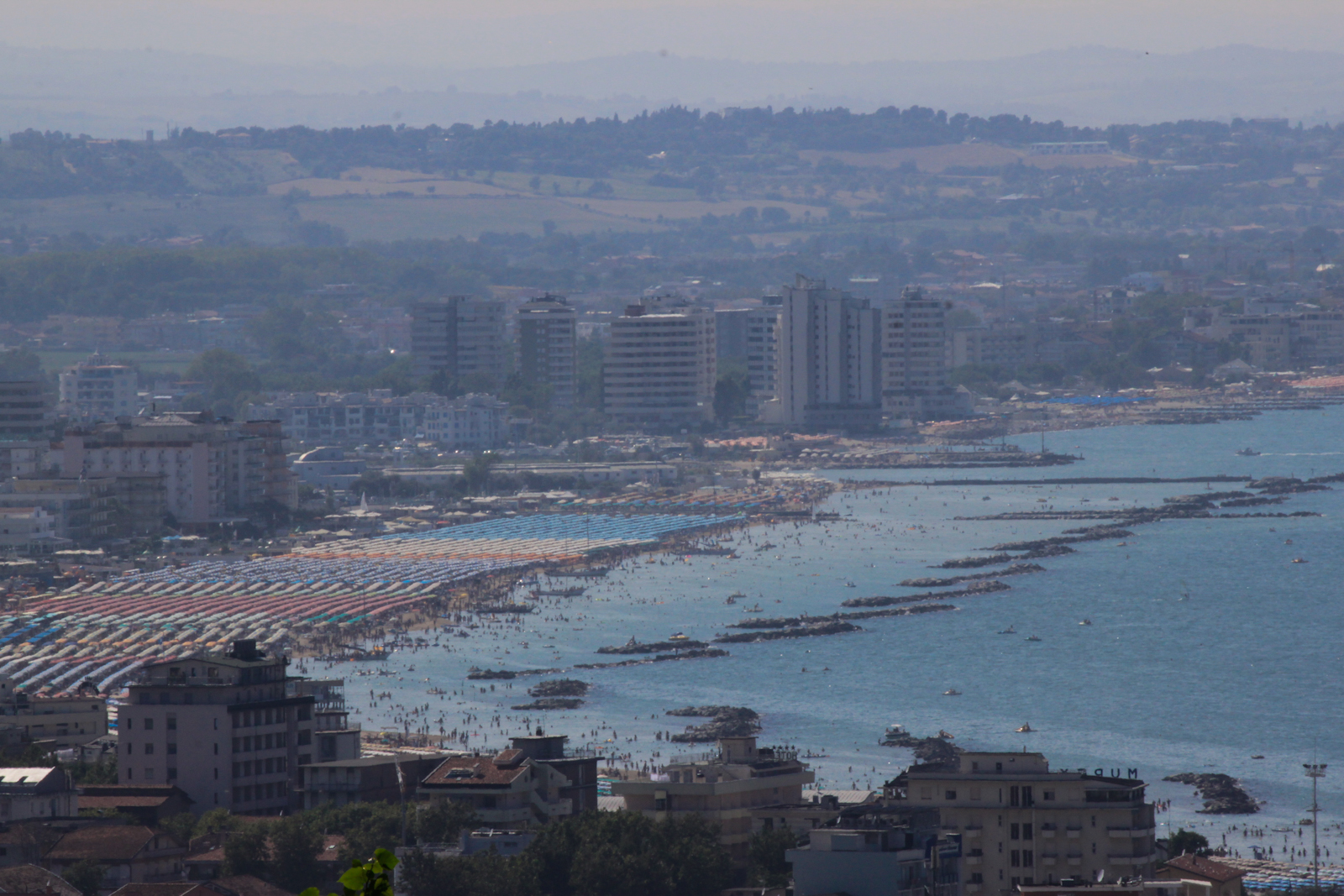 Spiaggia di Cattolica